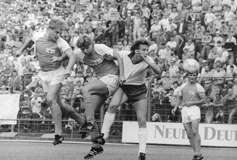 ADN-ZB-Settnik-5.9.87-zin- Berlin: Fußball-Oberliga 1. FC Union Berlin - Stahl Riesa 0:0- Diesen "Luft-Dreikampf" konnte Olaf Seier (l.) für sich entscheiden und auf das Tor der Gäste köpfen. 2.v.l. Rene Unglaube (beide Union), 3.v.l. der Riesaer Detlef Müller. Die Gastgeber scheiterten vor 8 000 Zuschauern in einem schwachen Spiel an ihrer schlechten Chancenwertung."